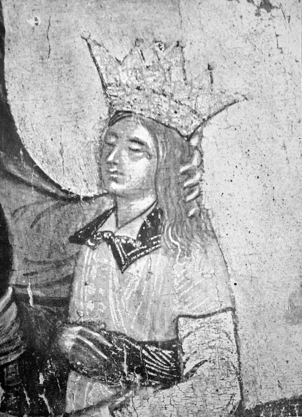 Teodosie (depicted dead) in a contemporary icon